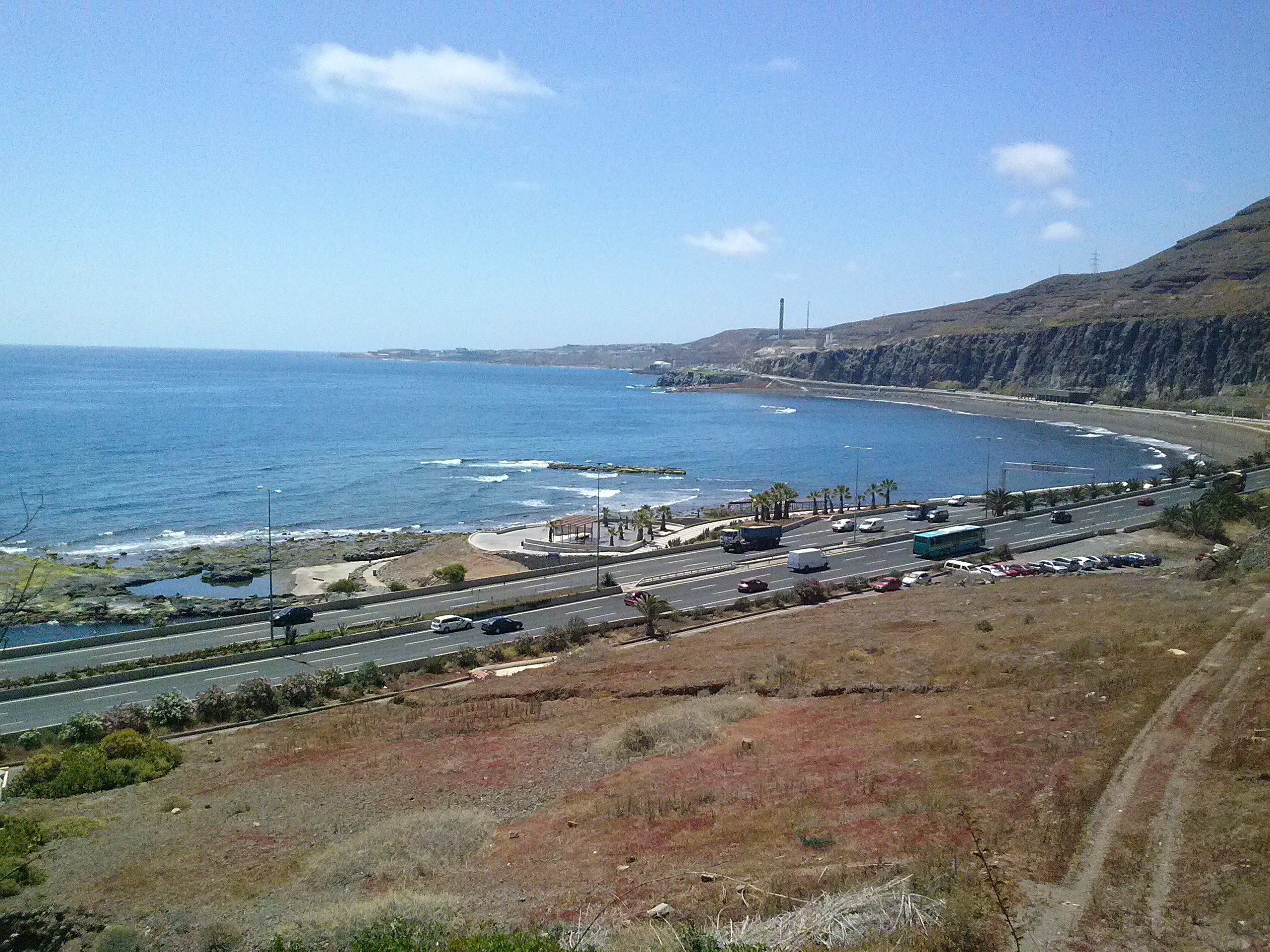 Vista de las nuevas piscinas a la izquierda más o menos al centro inferior, Playa de la Laja a la derecha de la imagen y aproximadamente en la mitad derecha y superior de la línea marcada por el horizonte —siempre en tierra— la icónica chimenea de la ya desmantelada desaladora situada a las afueras de Las Palmas de Gran Canaria en su parte sur.